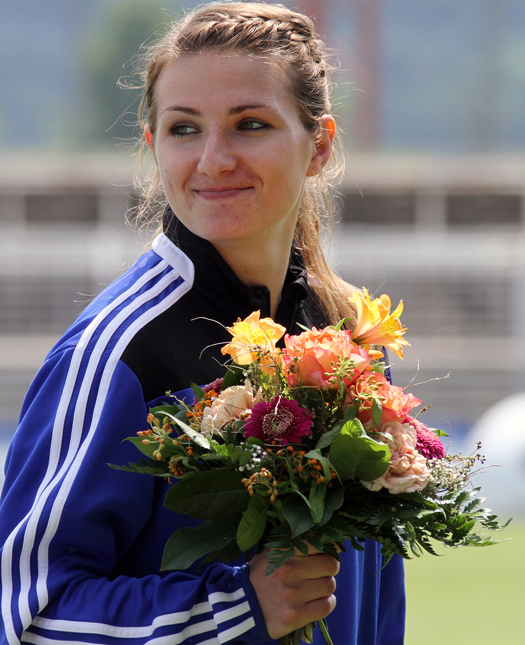 Klara Muhle am 01.06.2014